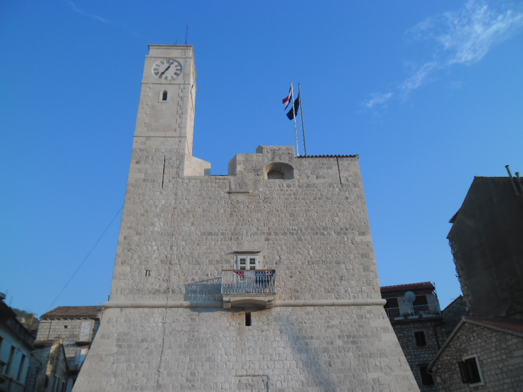 Komiža